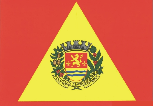 Flagge der Stadt Alta Floresta im brasilianischen Bundesstaat Mato Grosso.